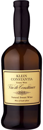 Een foto met witte achtergrond van een fles Vin de Constance.